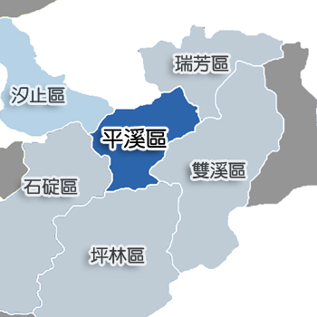 中文（台灣）: 平溪區相對位置。